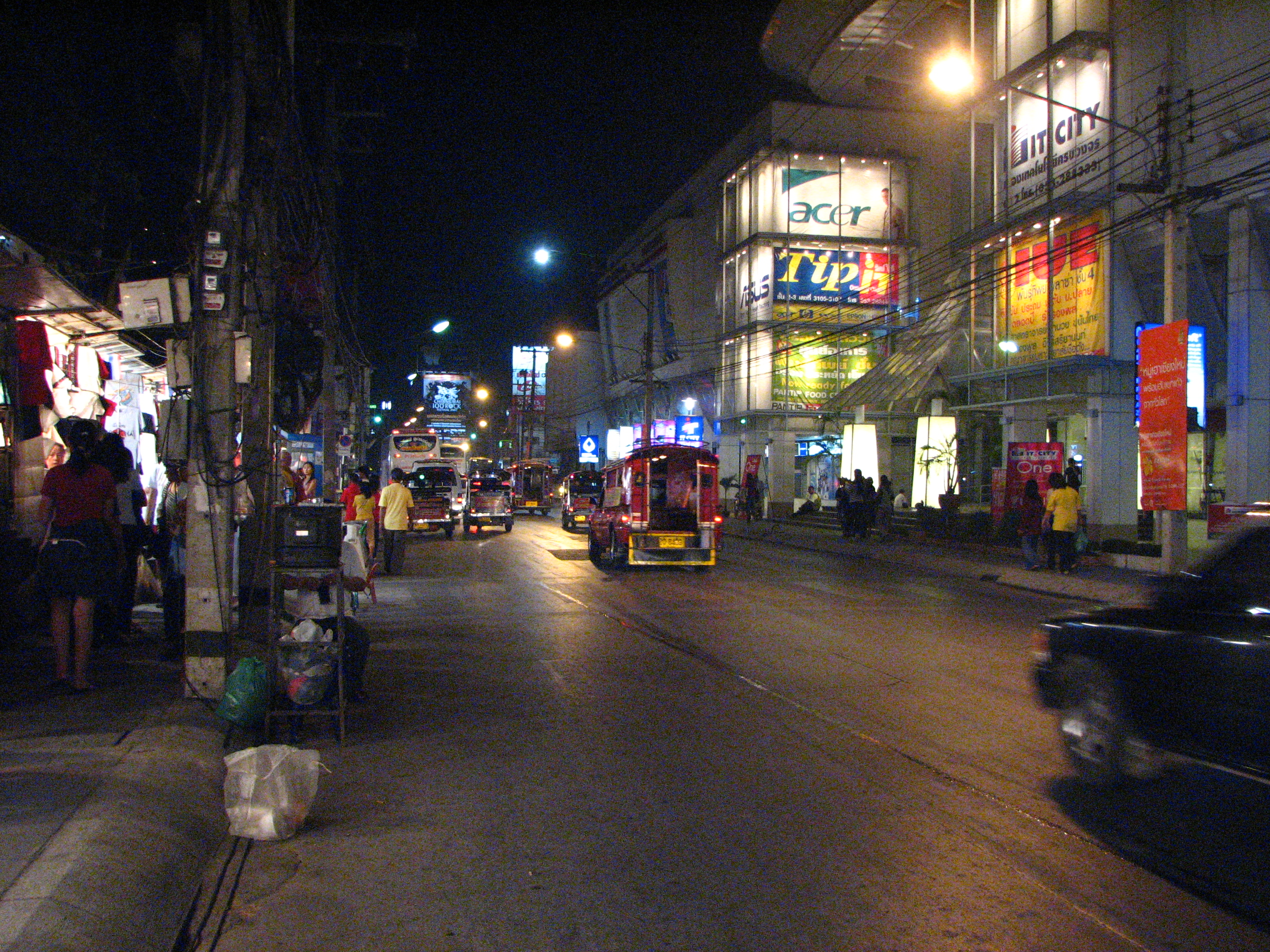 Chiang Mai Night Bazaar (Chang Khlan Road)